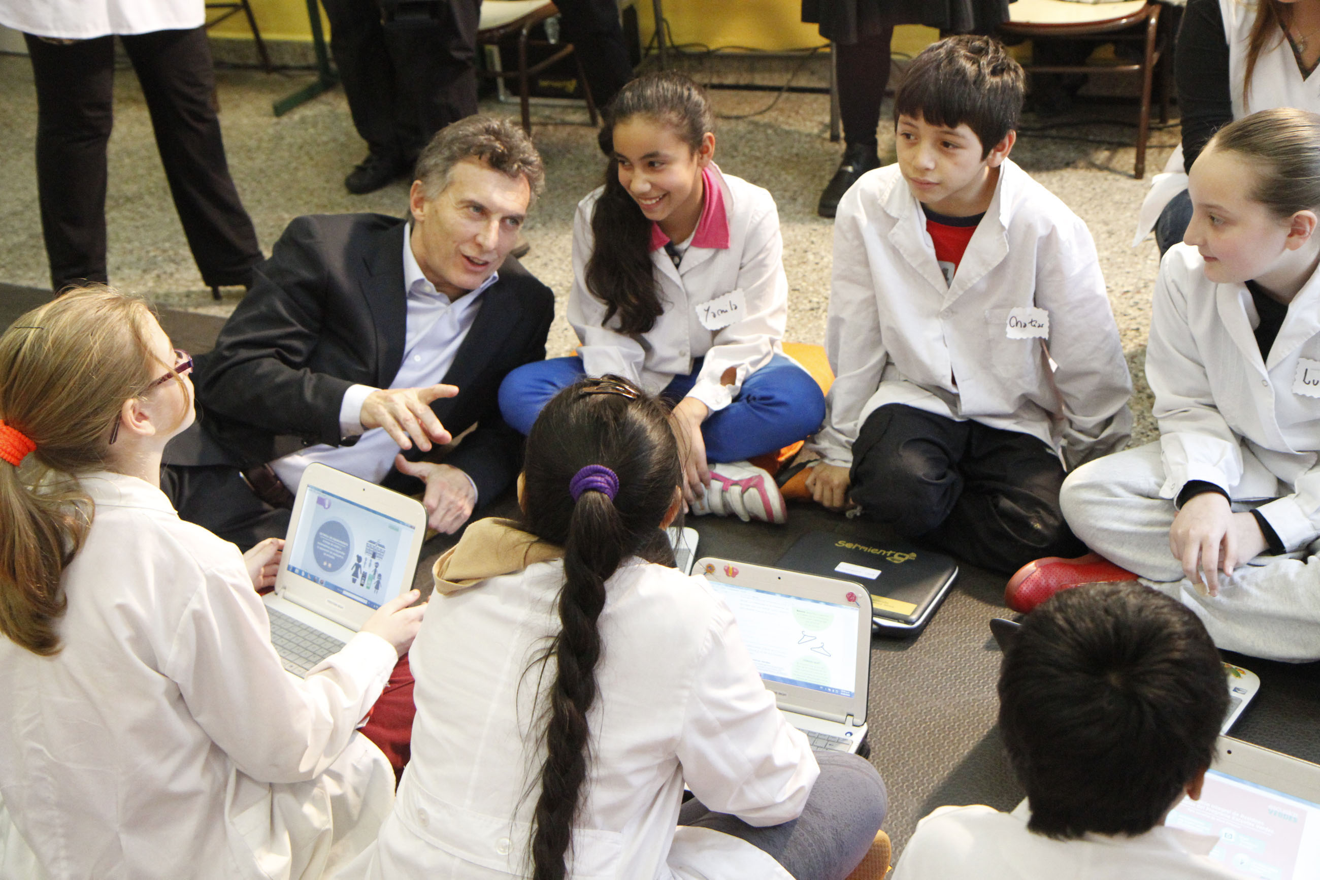 Mauricio Macri, jefe del Gobierno porteño, visitando el 15 de agosto de 2012 la escuela verde República de Chile, ubicada en el barrio de La Boca, en donde los alumnos llevan adelante tareas activas para el cuidado del medioambiente. Macri concurrió acompañado por el ministro de Ambiente y Espacio Público, Diego Santilli. Foto María Inés Ghiglione-gv/GCBA.